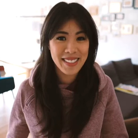 Wissenschaftskommunikation.de hat für die Rubrik Jobprofile in der Wissenschaftskommunikation Dr. Mai Thi Nguyen-Kim befragt. Frage 2/3: Besteht Ihr beruflicher Alltag aus dem was Sie am besten können oder am liebsten tun? Das gesamte Jobprofil von Mai Thii Nguyen Kim findet sich auf Wissenschaftskommunikation.de unter Arbeitswelt und den Jobprofilen.